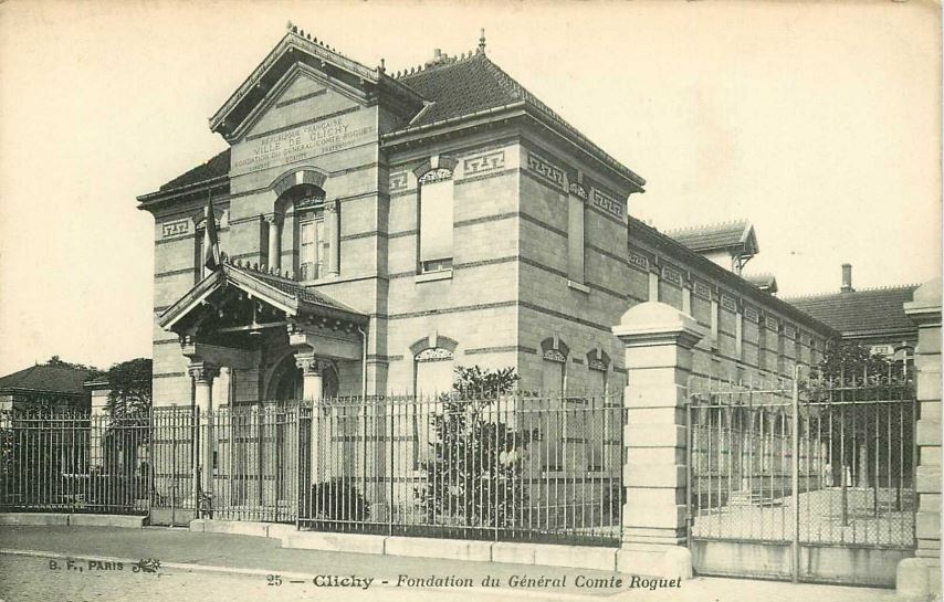 Clichy.Fondation du Général-Comte Roguet.Rue Georges-Boisseau